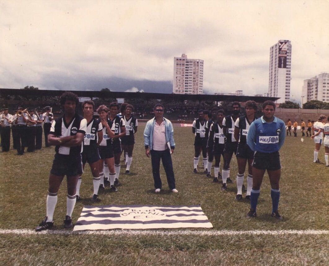 Estádio Serra Dourada, 1978. Time Goiânia.